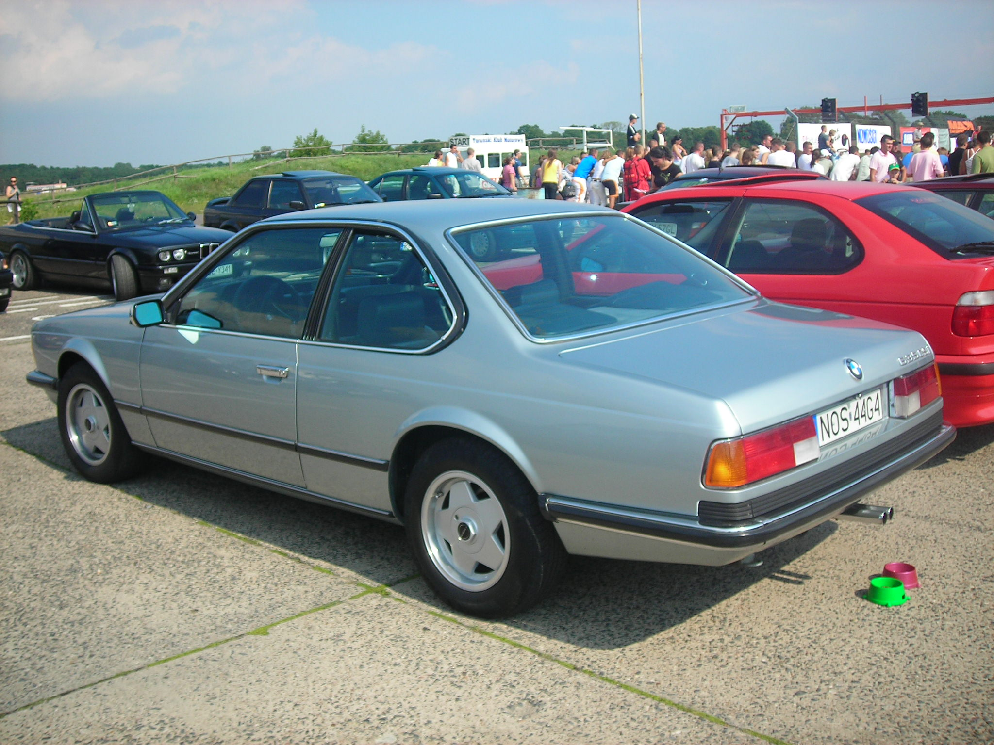 BMW e24 635CSi, Zlot BMW M Power Club w Toruniu.